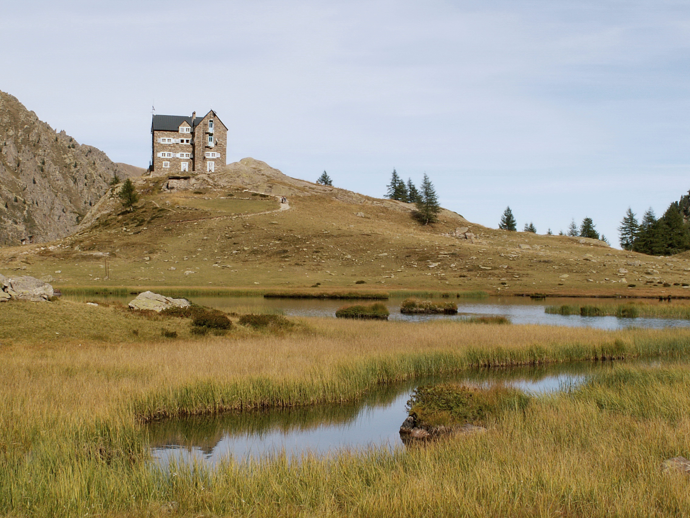 Alte Valli Stura e Maira (Q47364759)